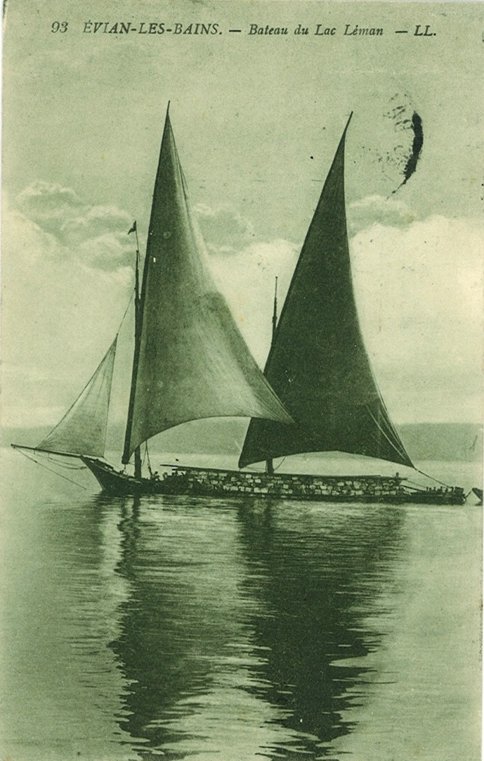 Barque du Léman devant Evian